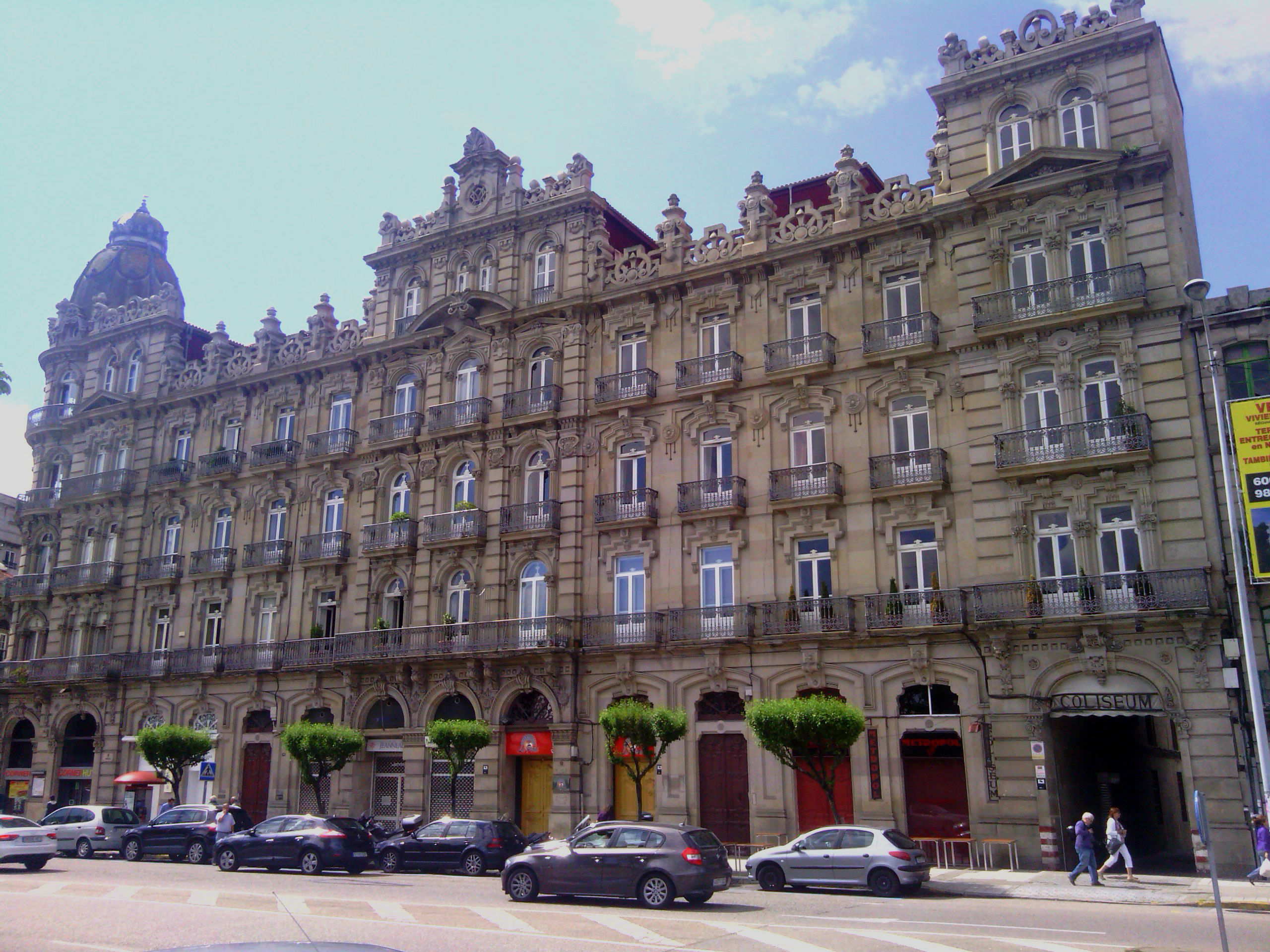 Foto del edificio Bonín, construcción modernista en VigoGalego: Foto do edificio Bonín, construción modernista en Vigo